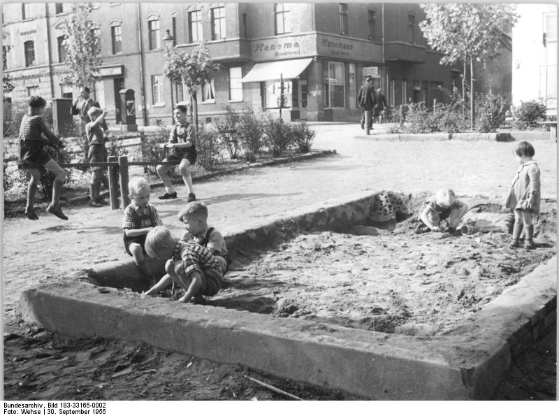 Erfurt, Spielplatz, Sandkasten Zentralbild TBD-Wehse 30.9.1955 -3194- 2 Motive Nationales Aufbauwerk in Erfurt. Mehr Spielplätze für unsere Kinder. So lange es die Witterung zulässt, spielen unsere Kinder im Freien. An jedem sonnigen Herbsttag erklingt auf dem Kinderspielplatz Gartenstrasse-Lachsgasse-Mao-Tse-tung-Ring frohes Kinderlachen. Hier wurde aus einer ehemaligen Trümmerstelle im Nationalen Aufbauwerk der Stadt Erfurt, inmitten der Großstadt eine Grünanlage geschaffen, in der sich unsere Kinder ungefährdet austoben können. Die Spielgeräte wurden von dem Schlossermeister Kurt Gross, und seiner Belegschaft in ca. 300 freiwilligen Arbeitsstunden geschaffen. UBz: Für unsere Kleinen ist der Sandkasten ein idealer Spielplatz.